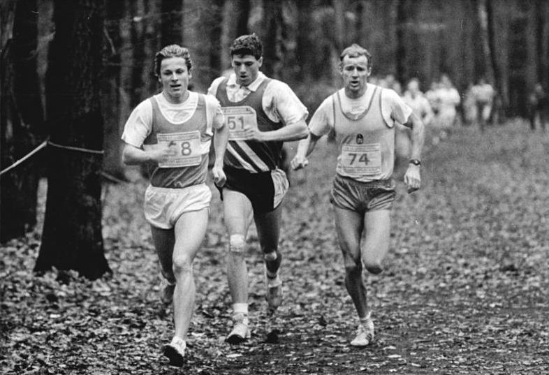 Berlin, Olaf Beyer, Jens Karraß, Hauke Fuhlbrügge ADN-ZB Grimm 13.11.88 Berlin: Beyer mit Hat-Trick- Olaf Beyer (ASK Potsdam- Nr. 74) ging als Gesamtsieger auf den drei Senioren-Hauptstrecken aus der dreigeteilten DVfL-Cross-Serie der Leichtathleten hervor. Der 31jährige Exeuropameister gewann nach den Rennen in Leipzig und Halle auch die 4-km-Distanz beim Willi-Sänger-Gedenklauf. Jens Karraß (SC Cottbus, l.) und Hauke Fuhlbrügge (SC Turbine Erfurt, M.) hatten nichts mehr entgegenzusetzen.